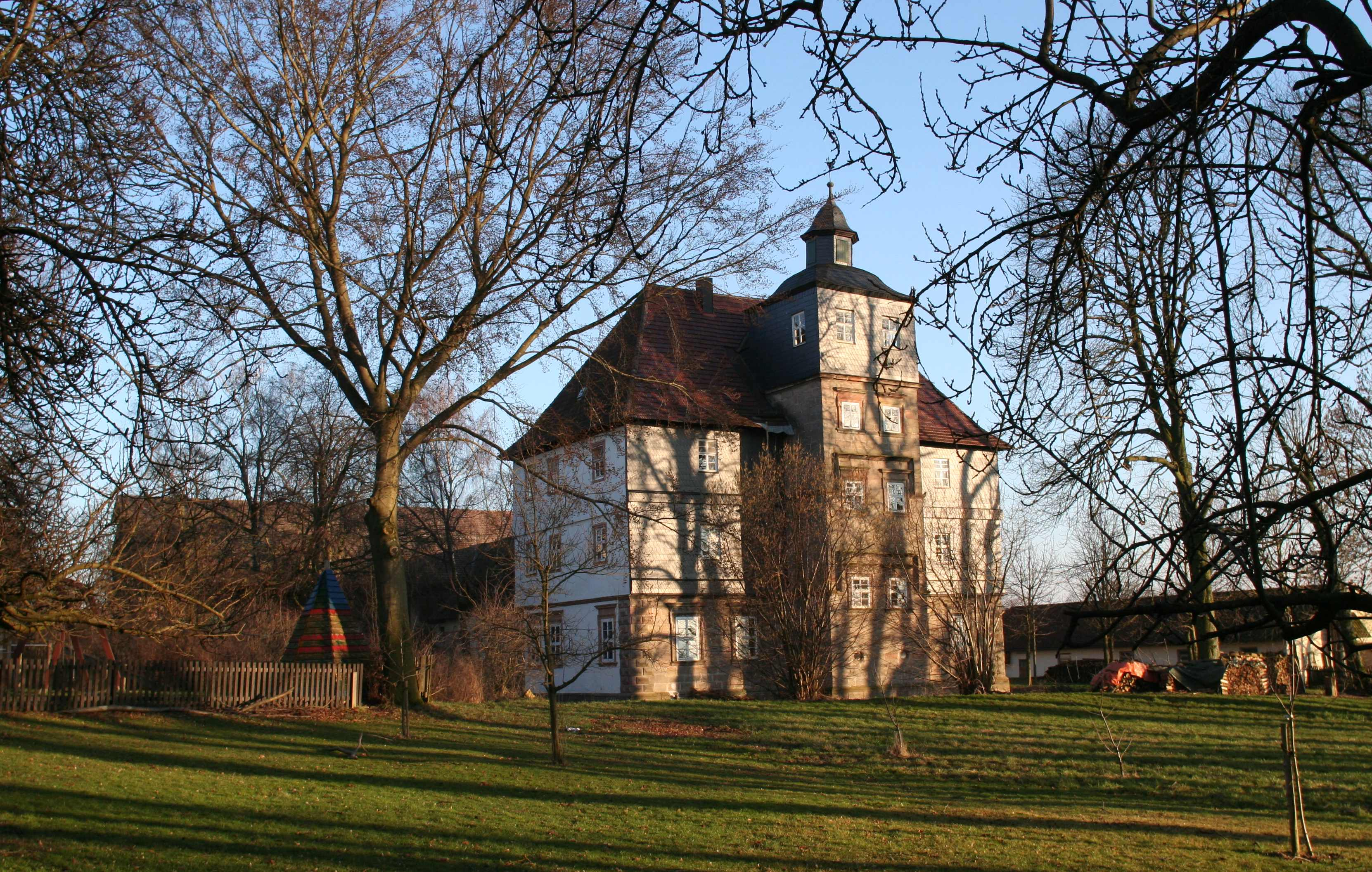 Wasserschloss Moggenbrunn, Gemeinde Meeder, Landkreis Coburg